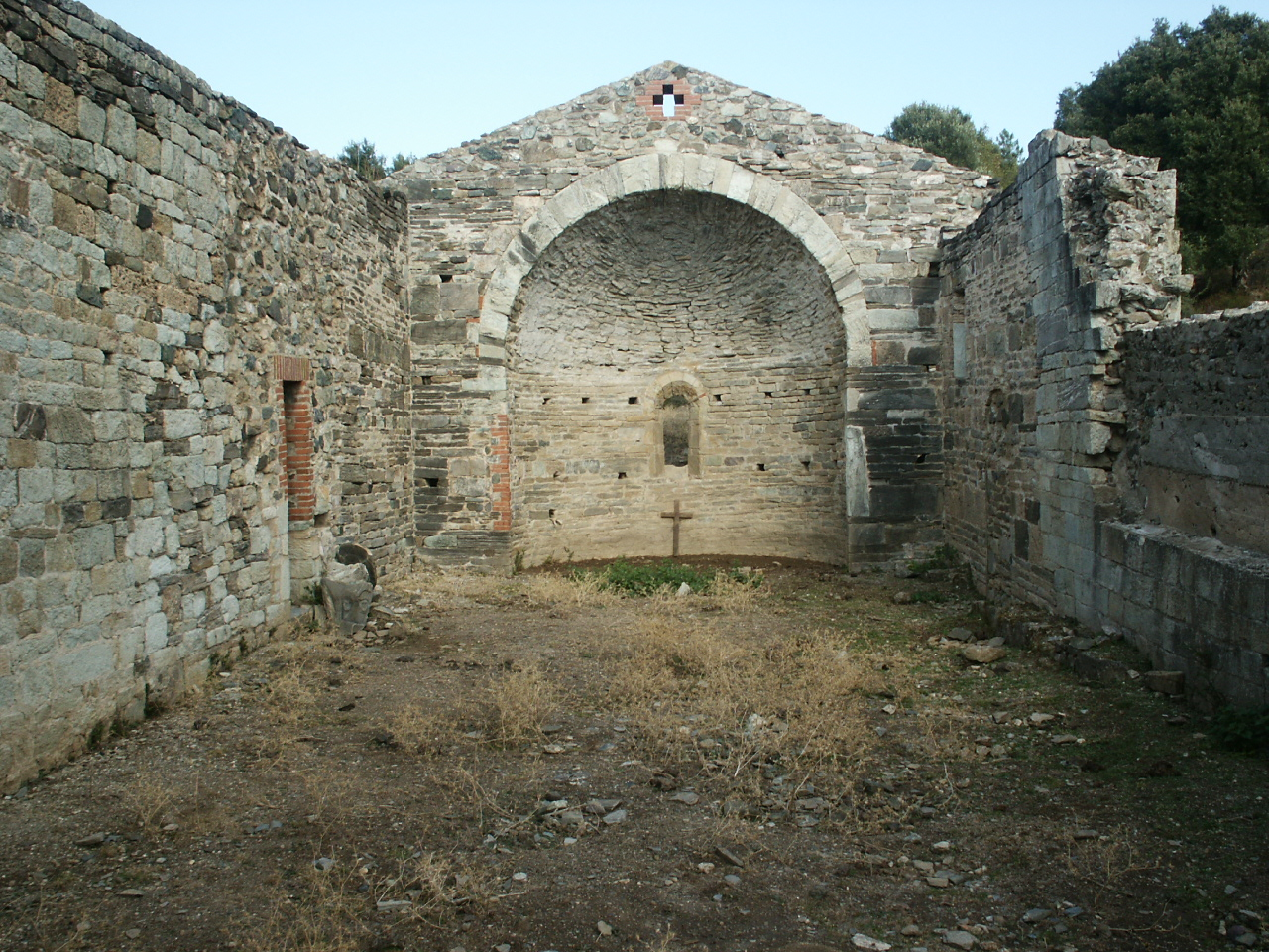 eglise santa maria riscamone, valle di rustinu, corsica